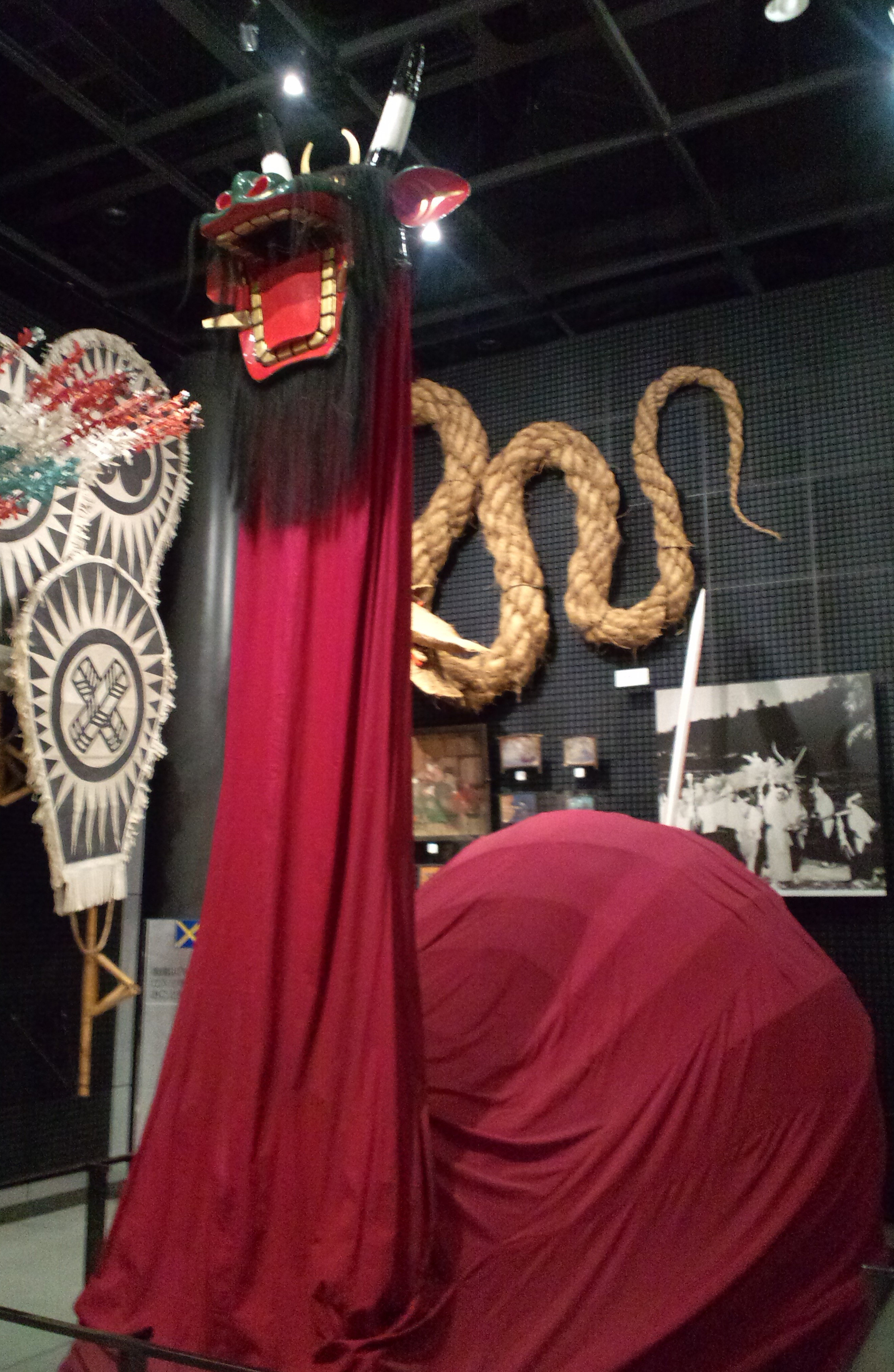 国立民族学博物館（大阪） 牛鬼＜うしおに＞（愛媛県、宇和島市、1978年製作）